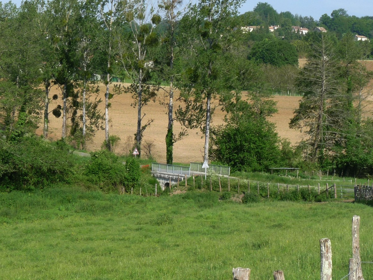 La Manore au pied de Rougnac (Charente, France)